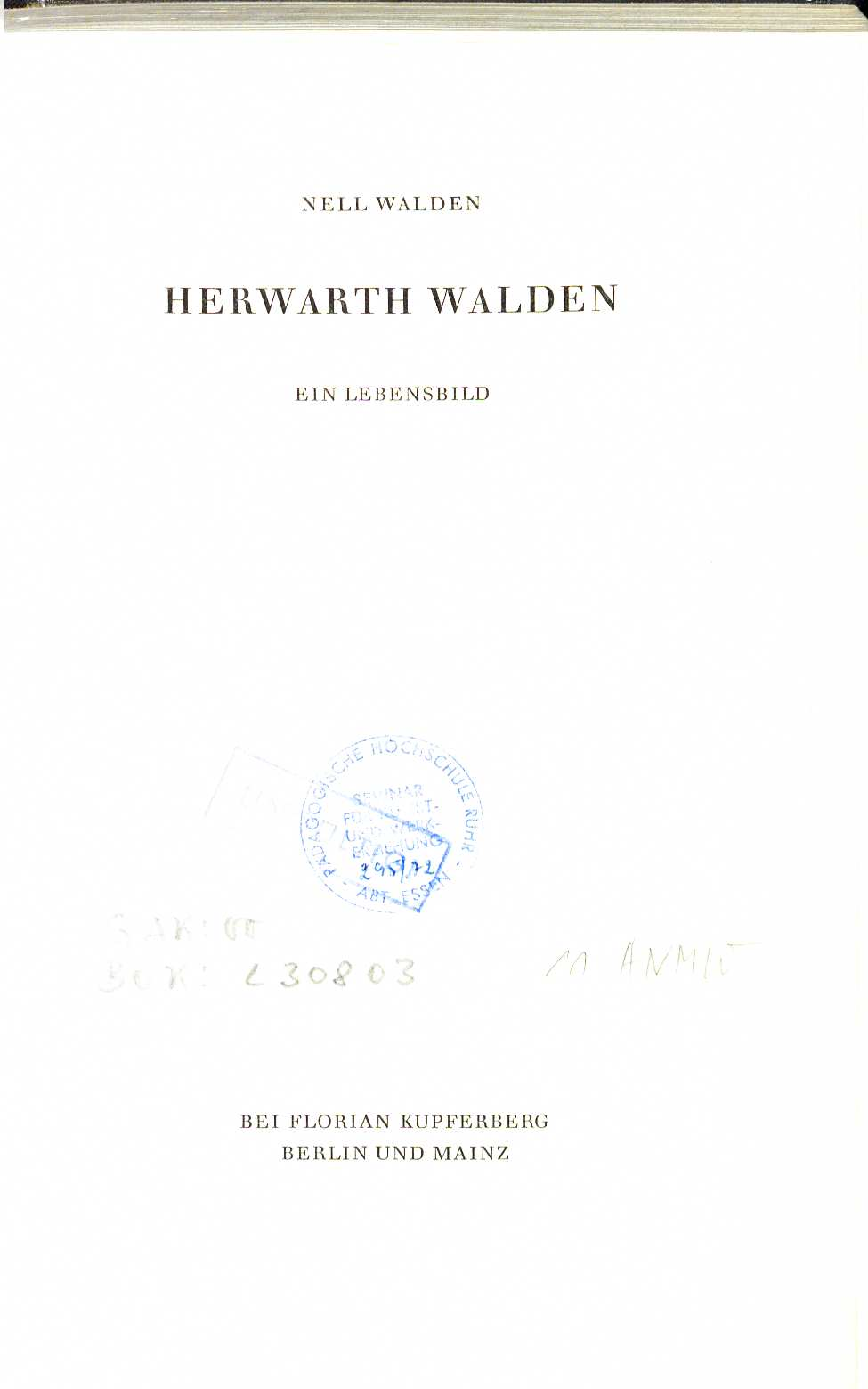 Nell Walden: Herwarth Walden. Ein Lebensbild. Berlin, Mainz : Florian Kupferberg, 1963 Titelblatt. Mit Bibliotheksstempeln und handschriftlicher Signatur